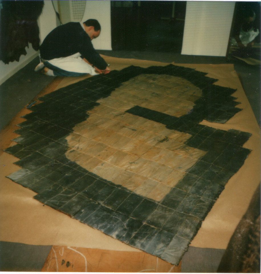 Pelzmodelle Kuhn, Klaus-Peter Kuhn Kürschnermeister Jörg Löppen zweckt einen Suslikimantel mit übergroßer unterer Weite auf dem Fußboden.